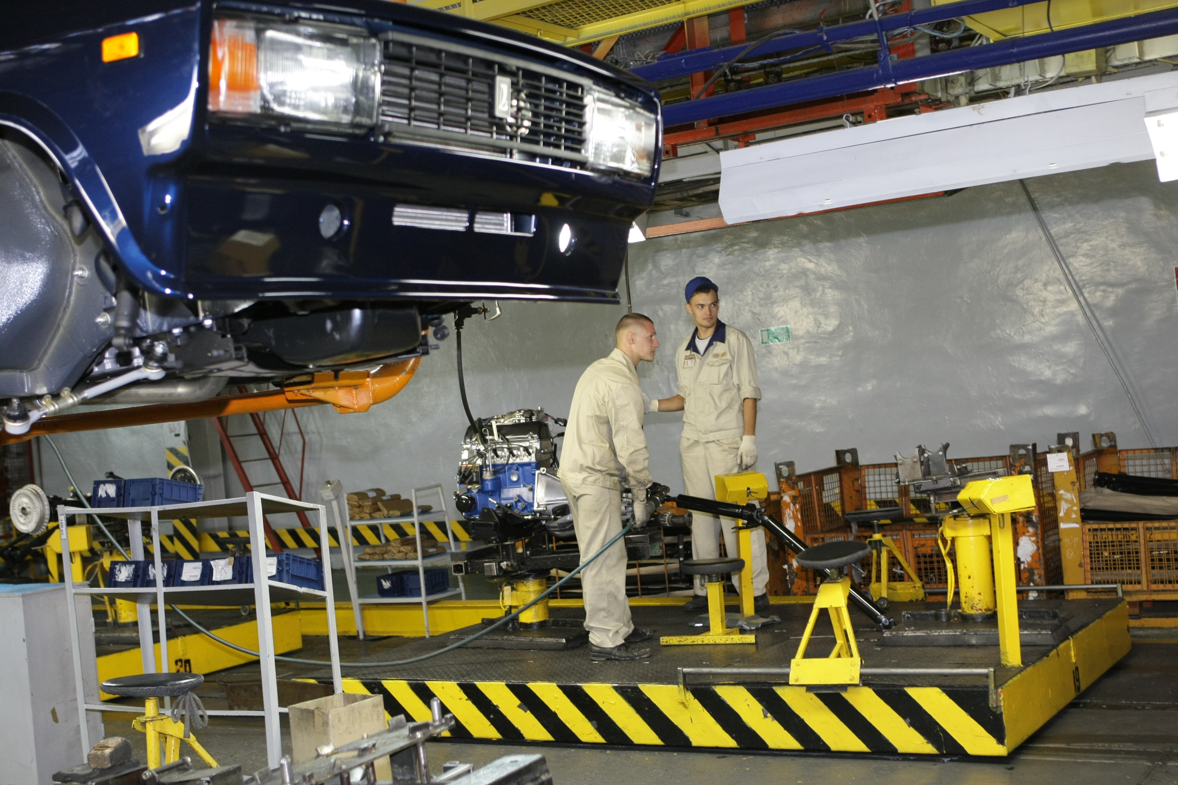 Цех ИжАвто.